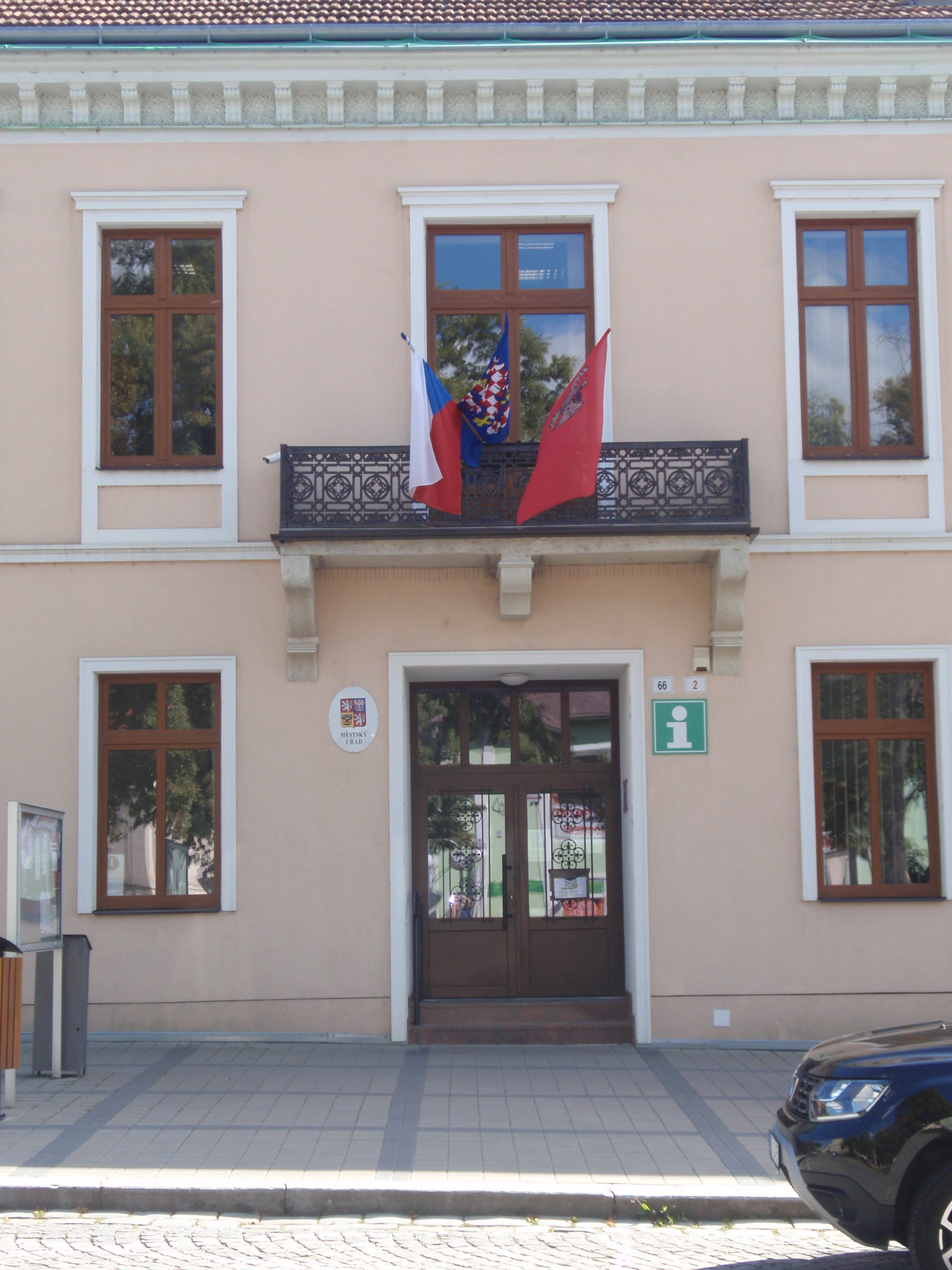 Městský úřad v Dolních Kounicích 4. července 2020 - moravská vlajka vyvěšena společně s vlajkou České republiky a s městskou vlajkou